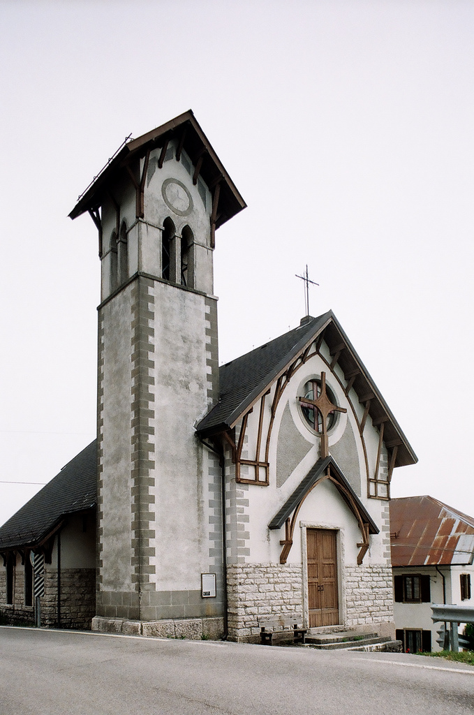 Chiesa sull'altopiano di Asiago.